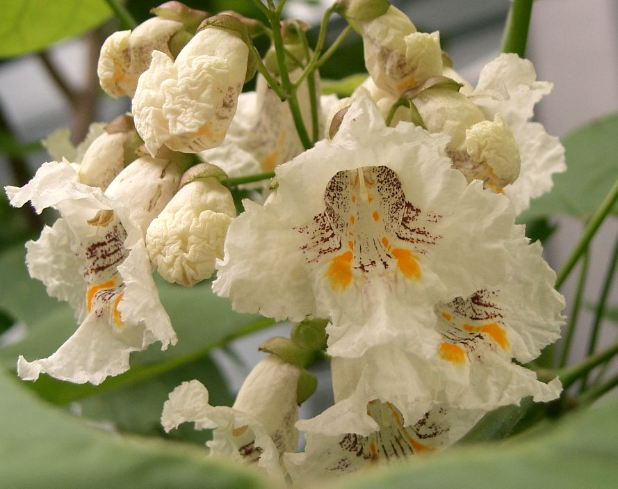 Catalpa bignonioides 'Aurea'